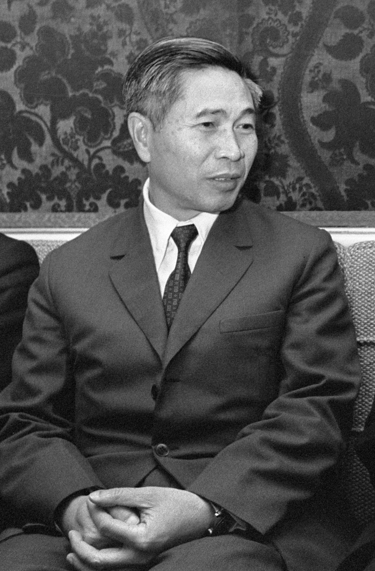 Vietnamese minister van Buitenlandse Zaken Nguyen Co Thach bij minister Van der Stoel